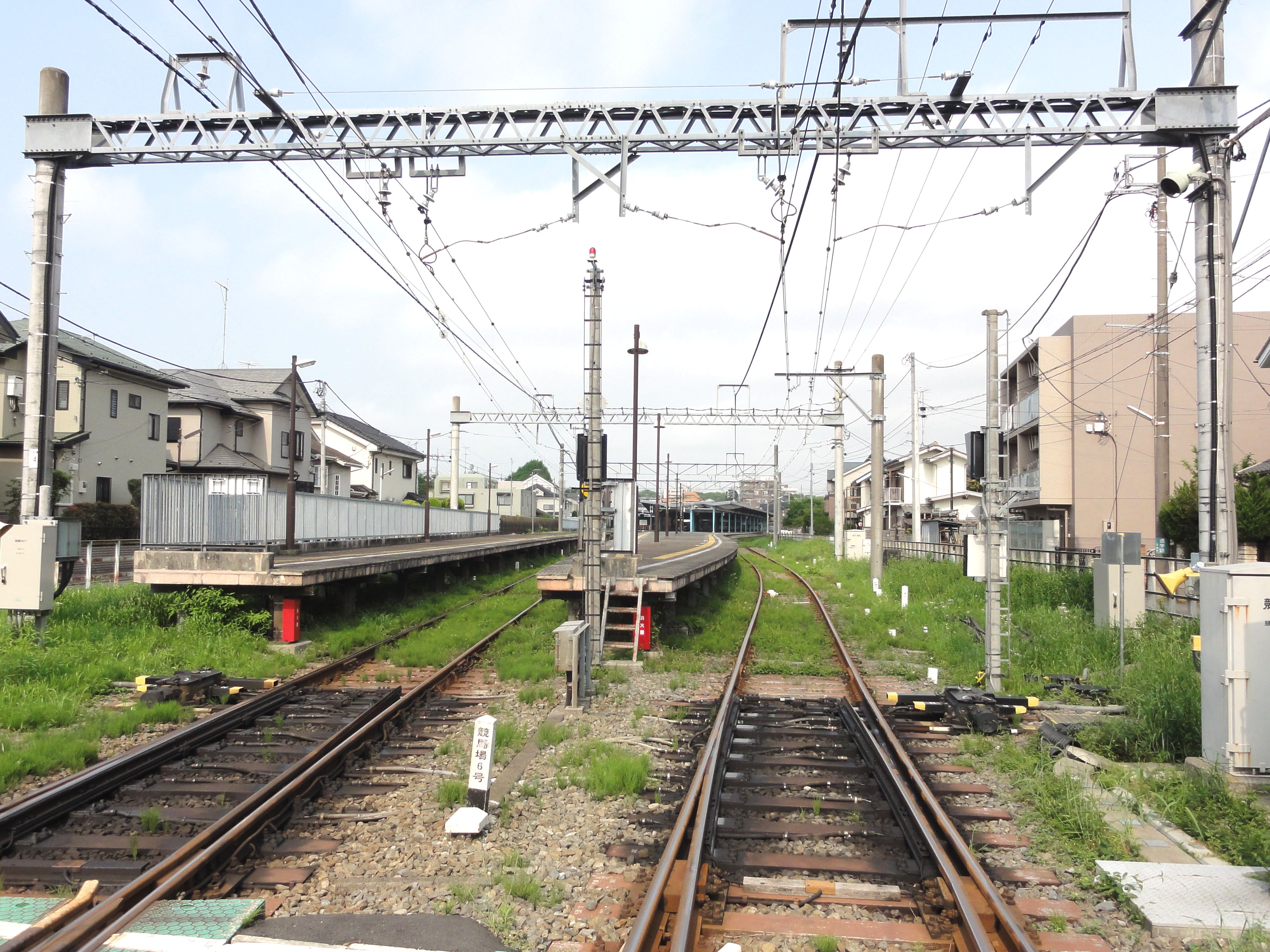 府中競馬正門前駅 ホーム